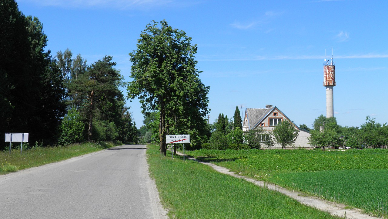 сувайнишкис-1